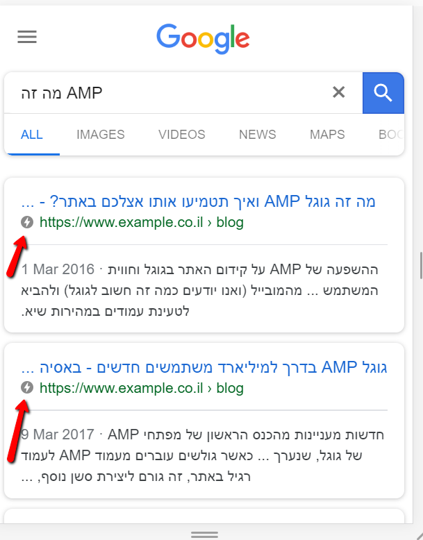 צילום מסך עם תוצאת חיפוש שמכילה AMP